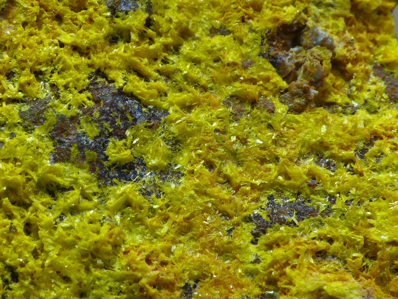 Phosphuranylit, South Alligator River, Australien, FOV: 10mm